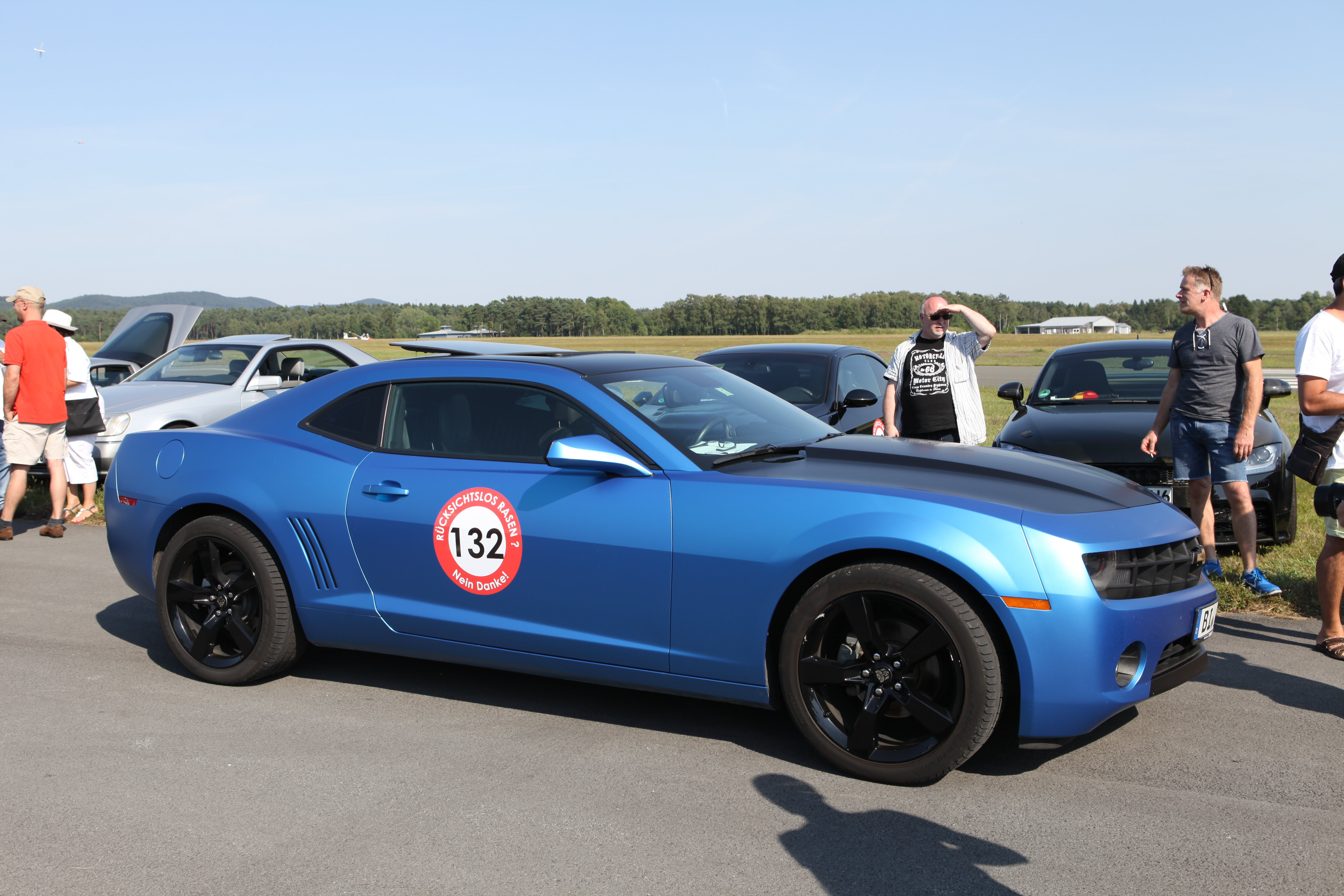 Chevrolet Camaro bei der Supercars Rallye 2014 unter dem Motto "Rücksichtlos Rasen? Nein Danke!"